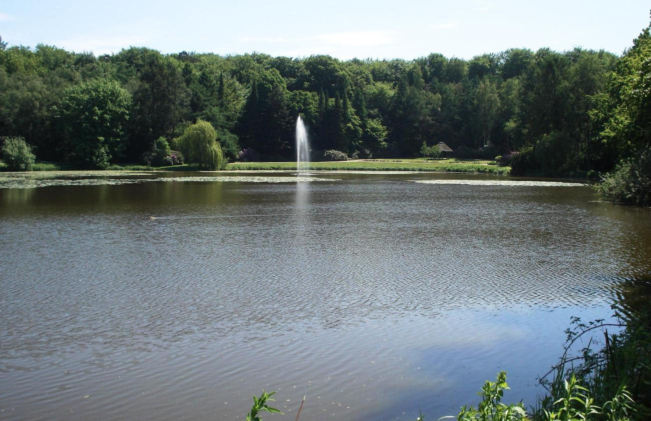 Schwartauer See aus NW mit Fontaine, der Mönchkamp (ein Wald) im Hintergrund